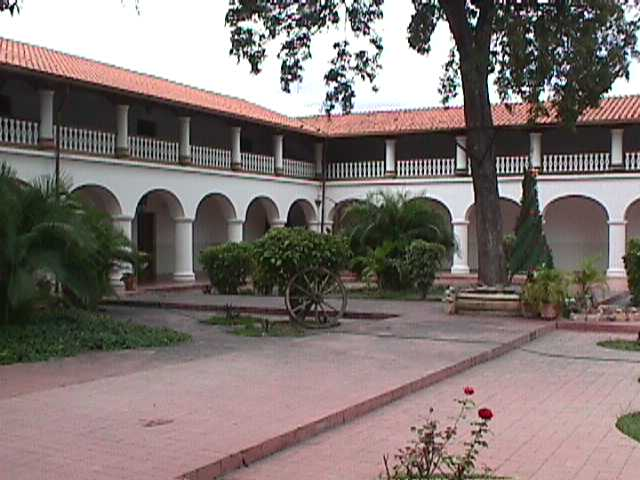 Casa de la Cultura Profesor José Ángel Rodríguez López en El Tocuyo, estado Lara - Venezuela 1999